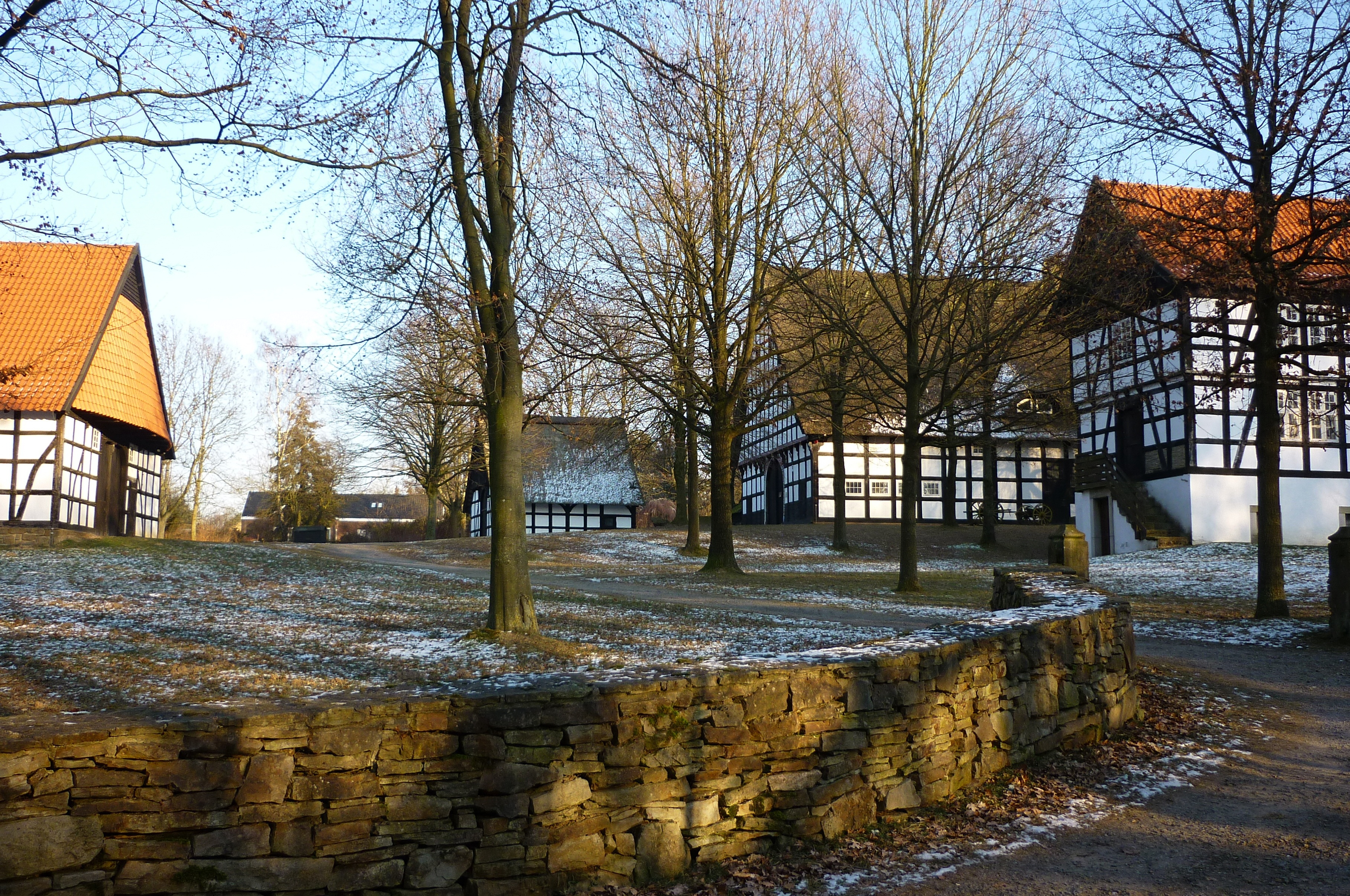 Bad Oeynhausen, Heimatmuseum im Siekertal („Museumshof“)